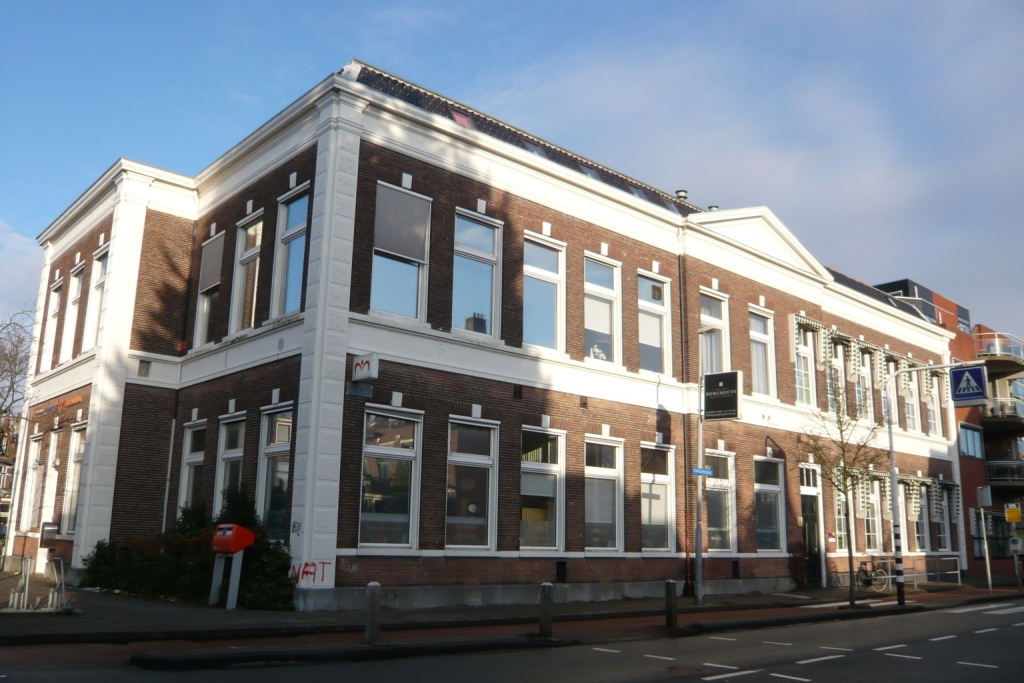 Haarlem Middelbare Meisjes School of de meisjes HBS, een 5 jarige hbs met meer talen. Tempeliersstraat 1, Haarlem